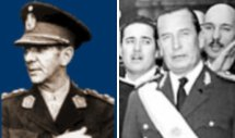 General Eduardo Lonardi y General Pedro Eugenio Aramburu. Revolución Libertadora (1955-1958). Argentina.